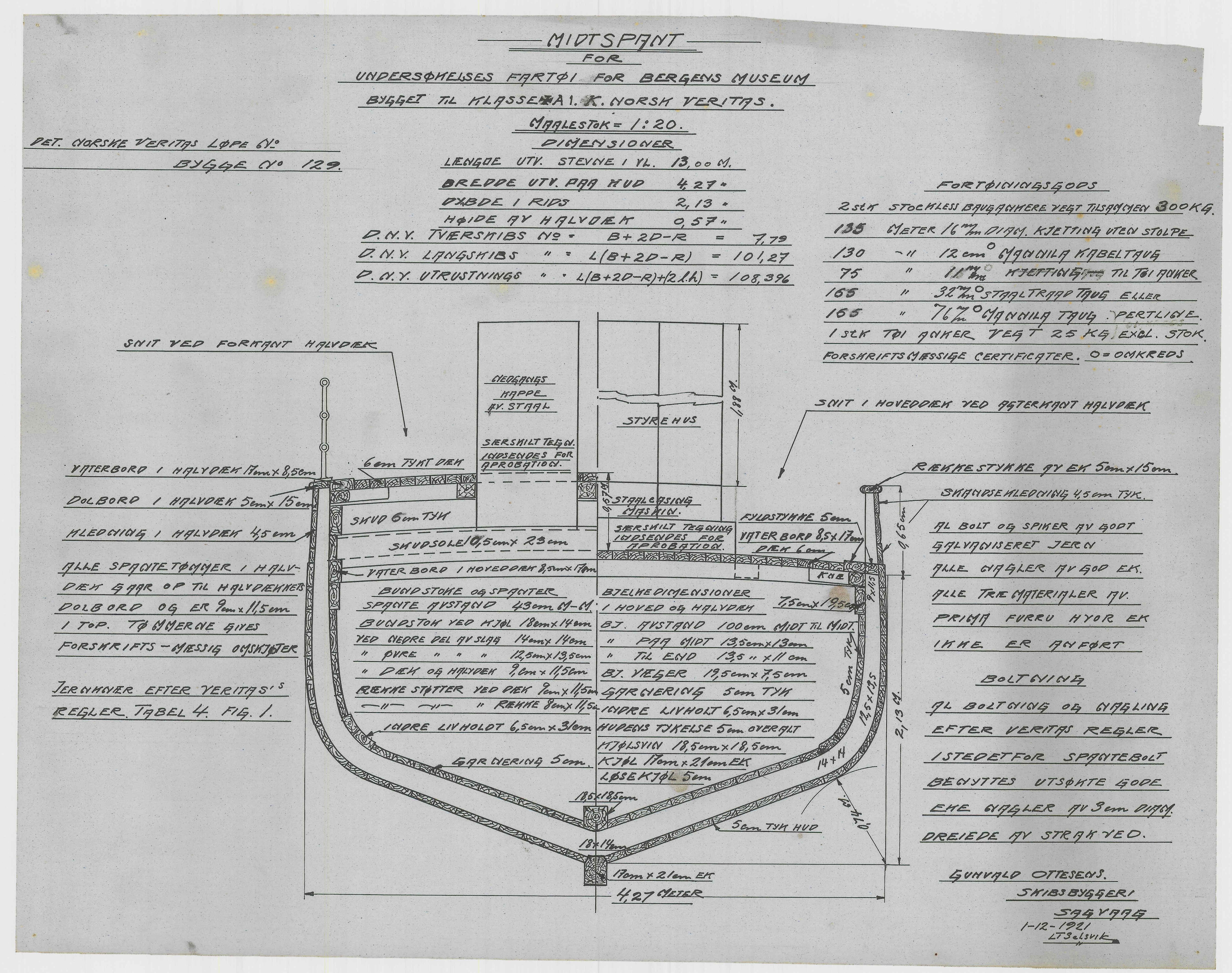 Plantegning for havforskningsfartøyet Herman Friele. Fartøyet ble bygd for Bergen Museum av Ottesens Skipsbyggeri og stod ferdig i 1922.